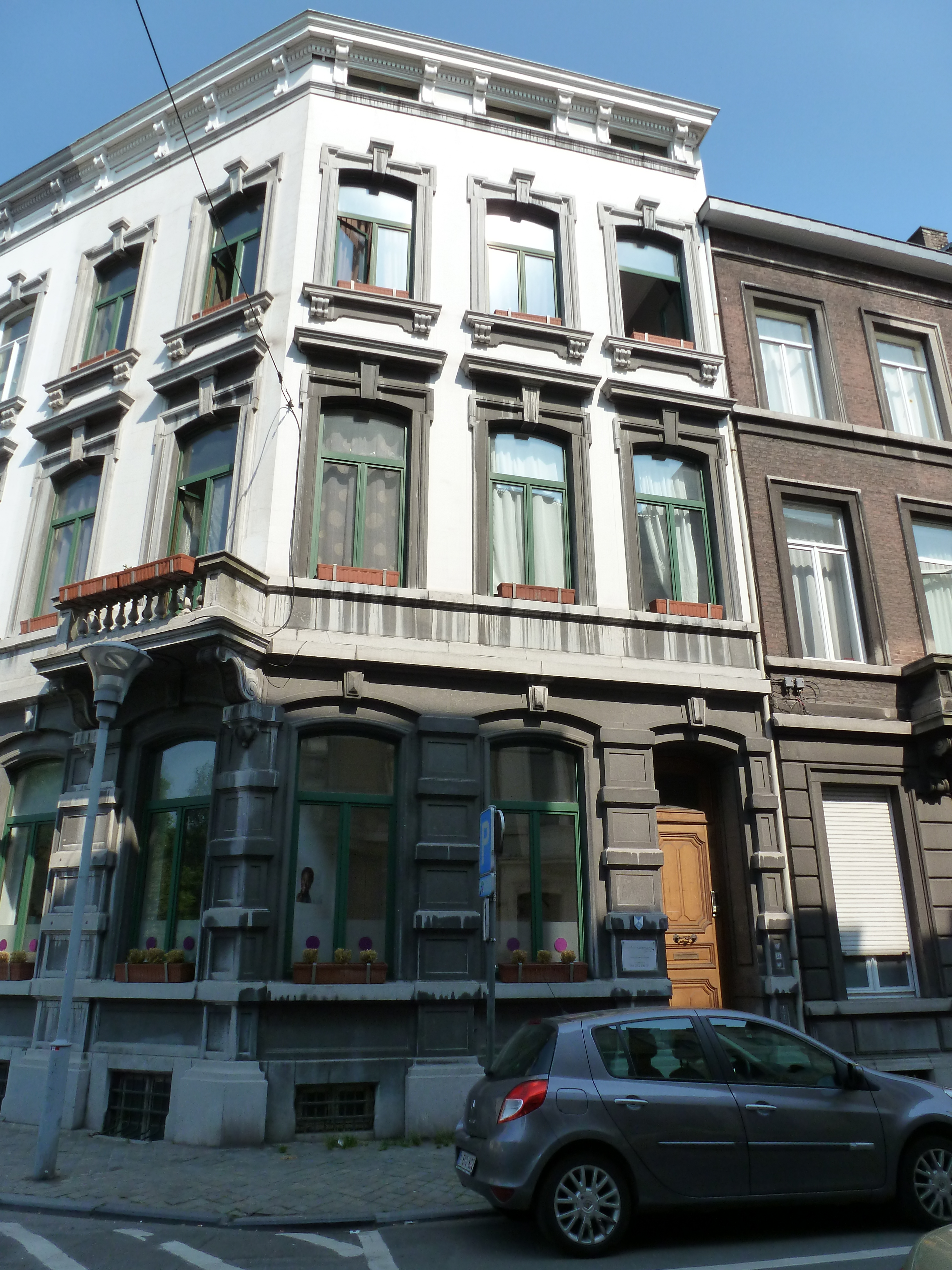 maison ancienne